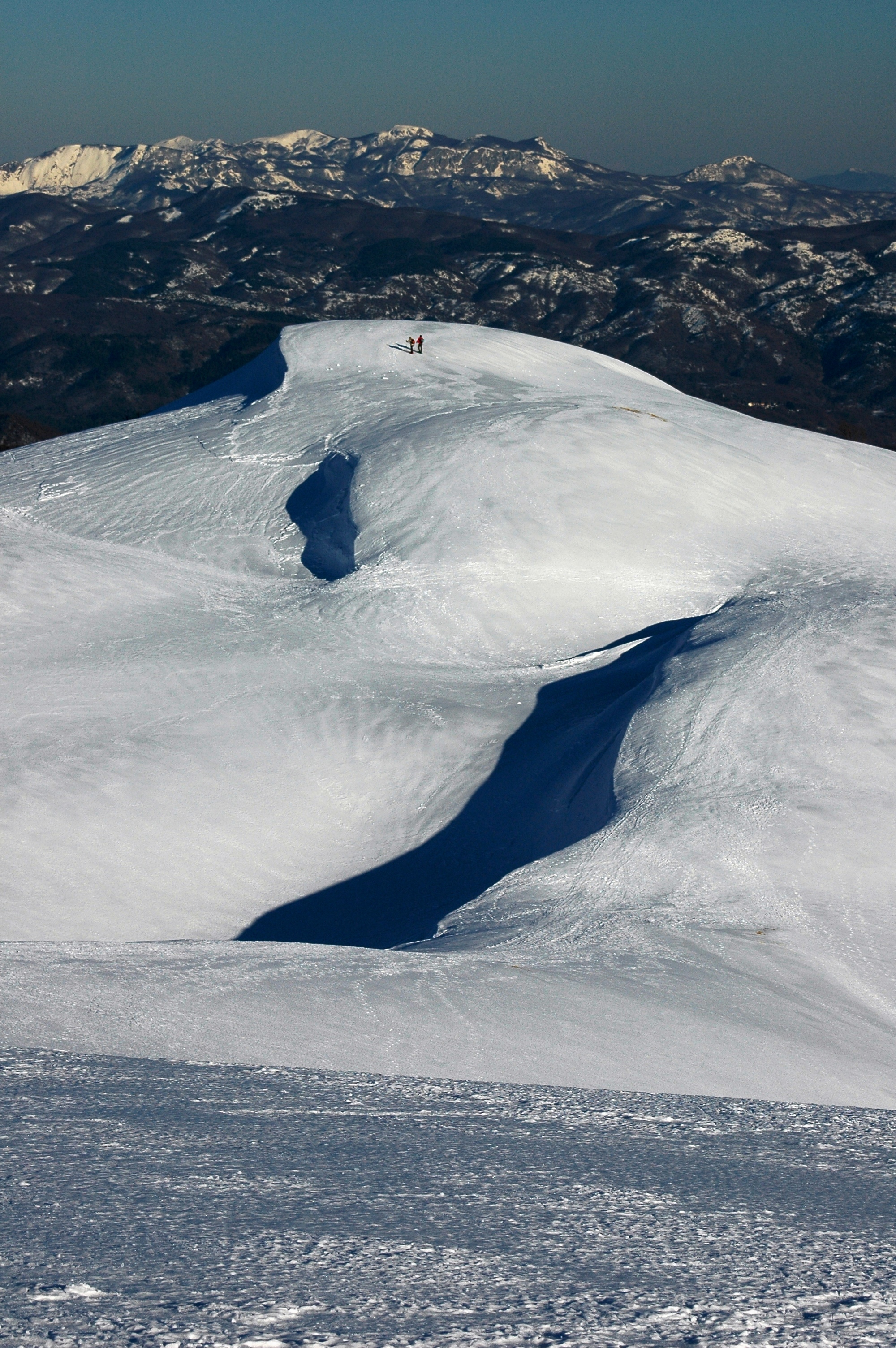 Inverno in Antola